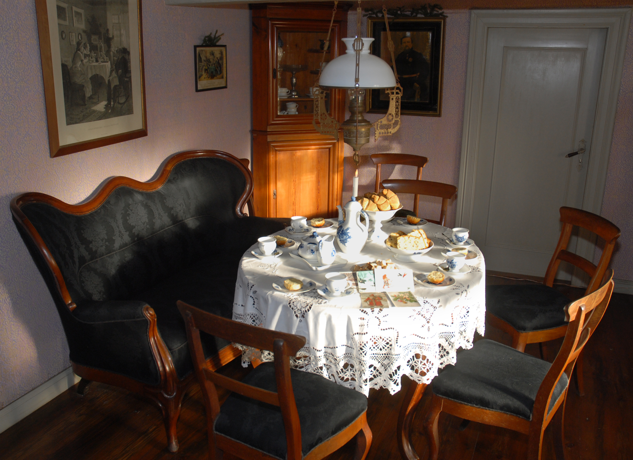 Møbler af mahognifinér med hestehårsbetræk var højeste mode i slutningen af 1800-tallet. I Kønne dørns er dækket op til gæster.